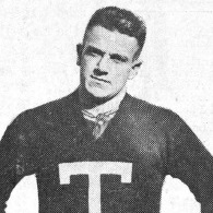 Albert Hill, Georgia Tech quarterback